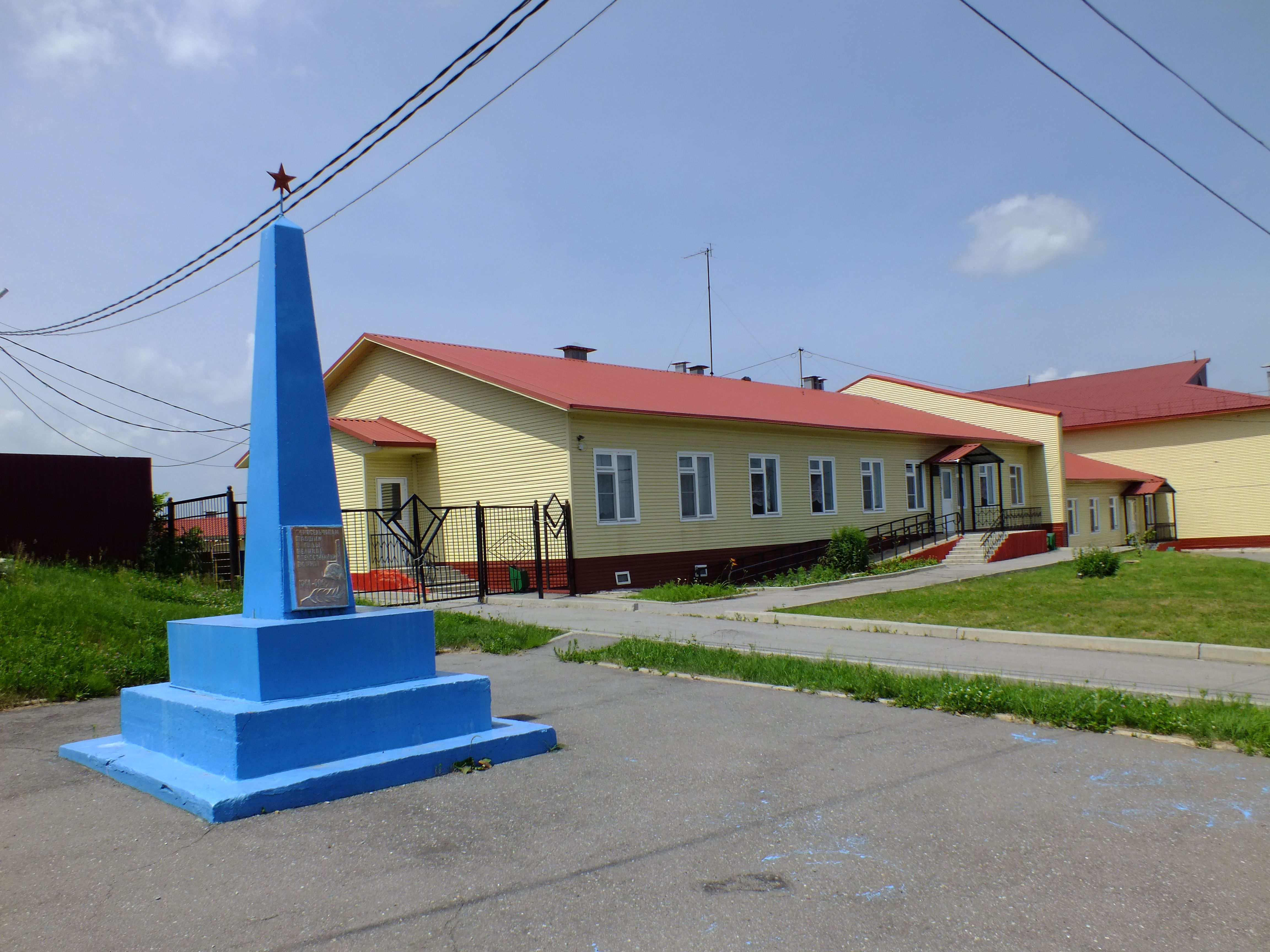 Sikachi-Alyan